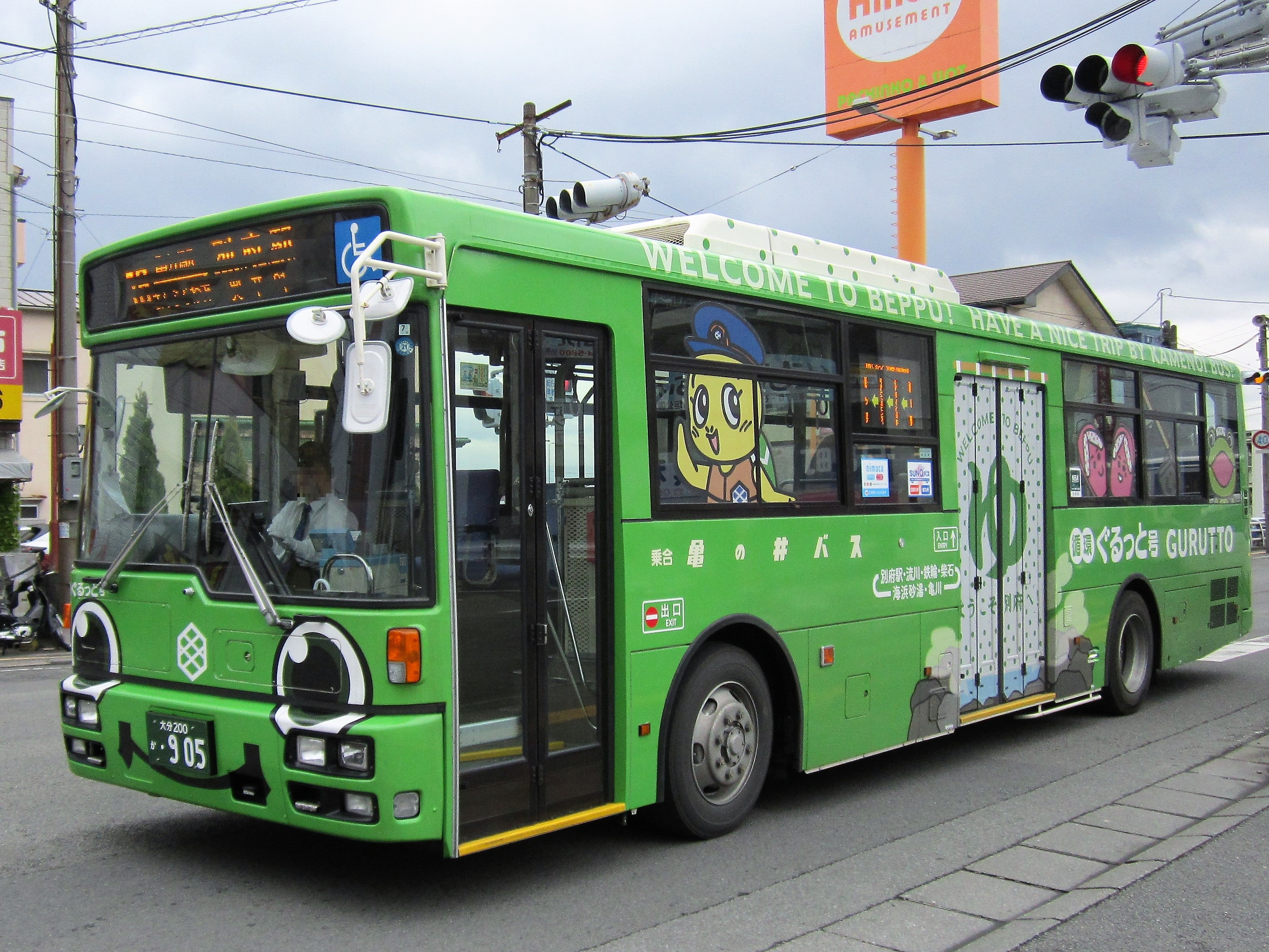 亀の井バス 循環ぐるっと号（亀川駅付近） Canon PowerShot A2200